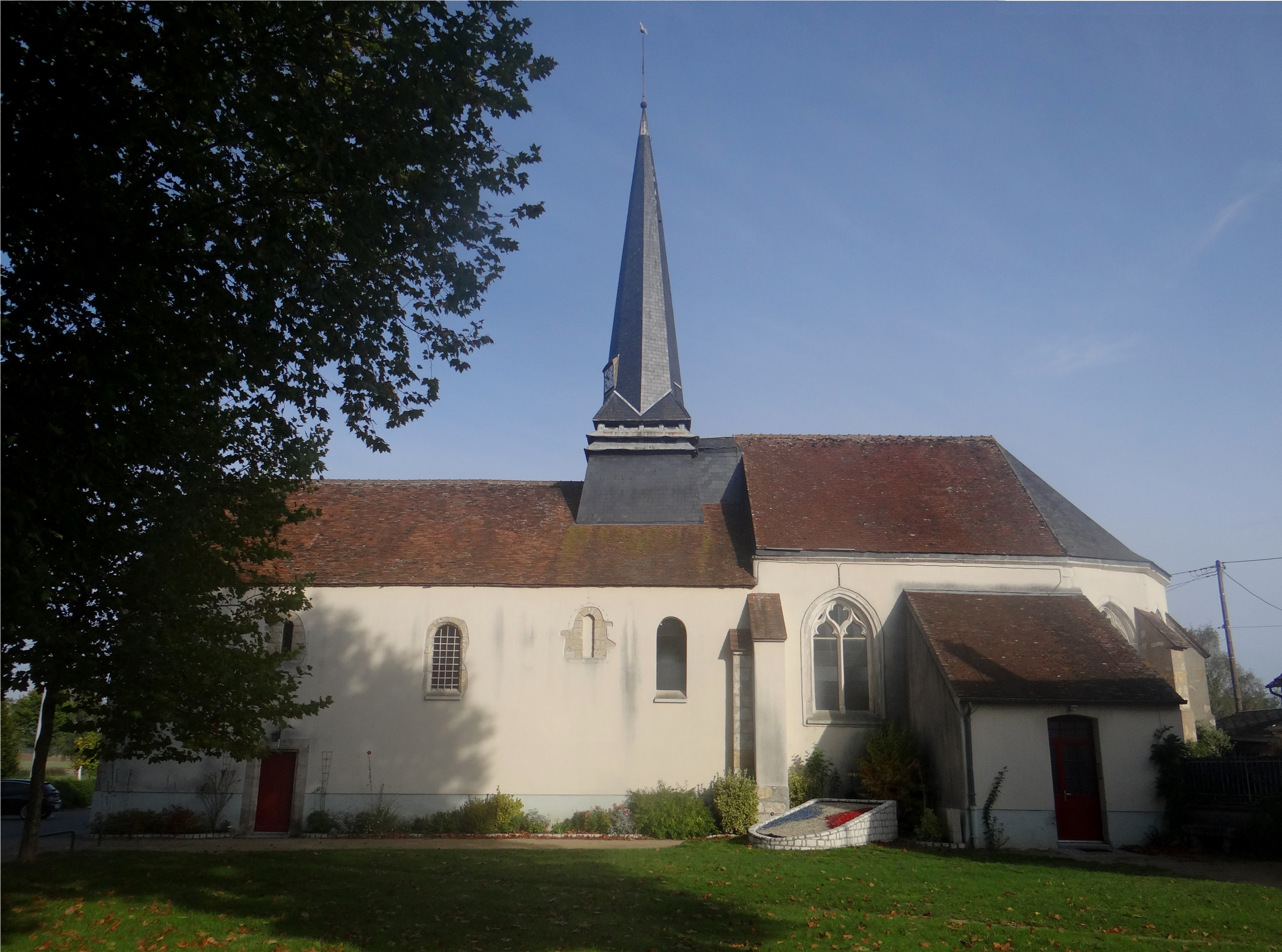 L'église paroissiale Saint-Aignan de Chailly-en-Gâtinais, Loiret, France.